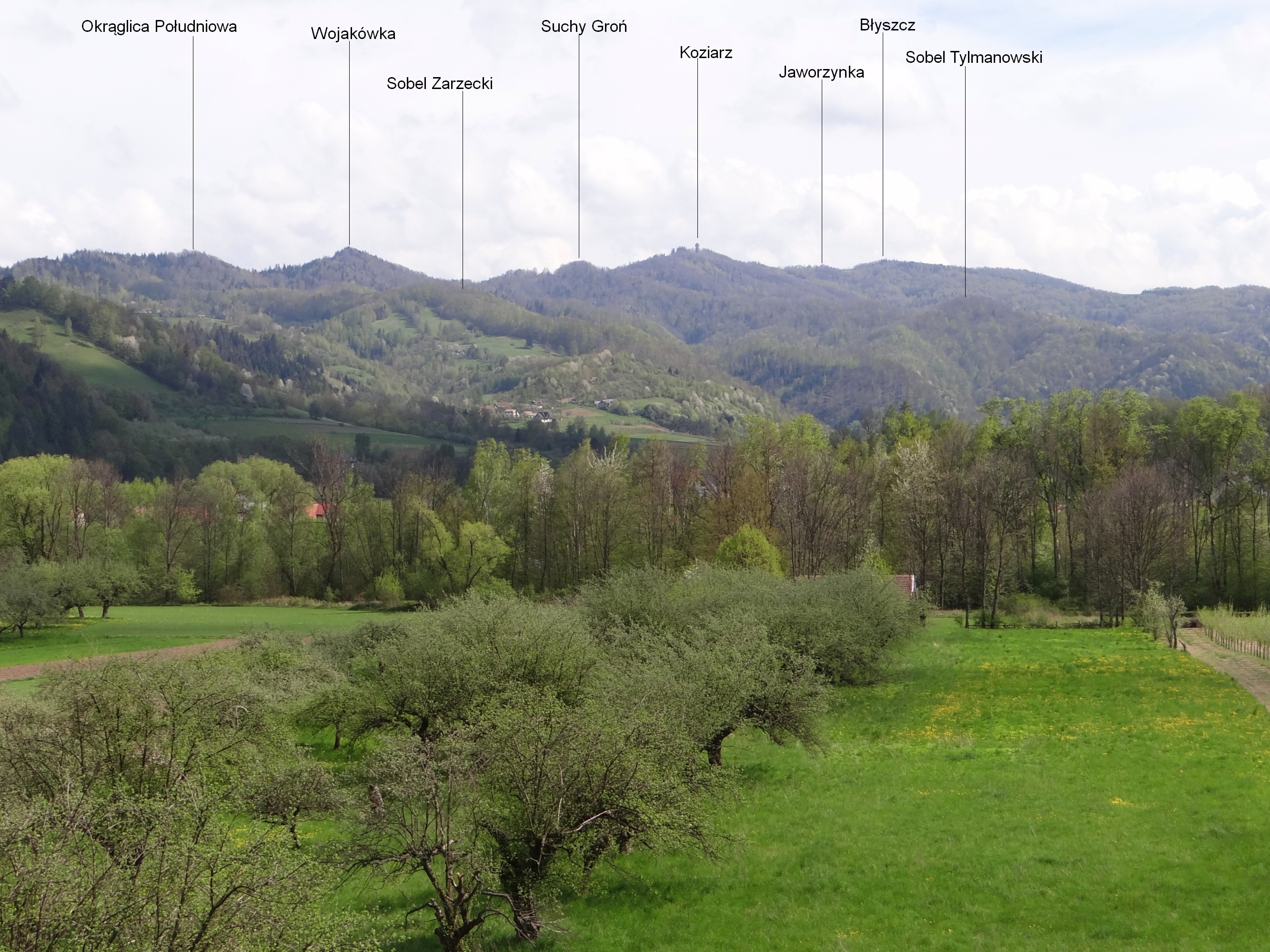 Widok z Zabrzeży od północno-zachodniej strony